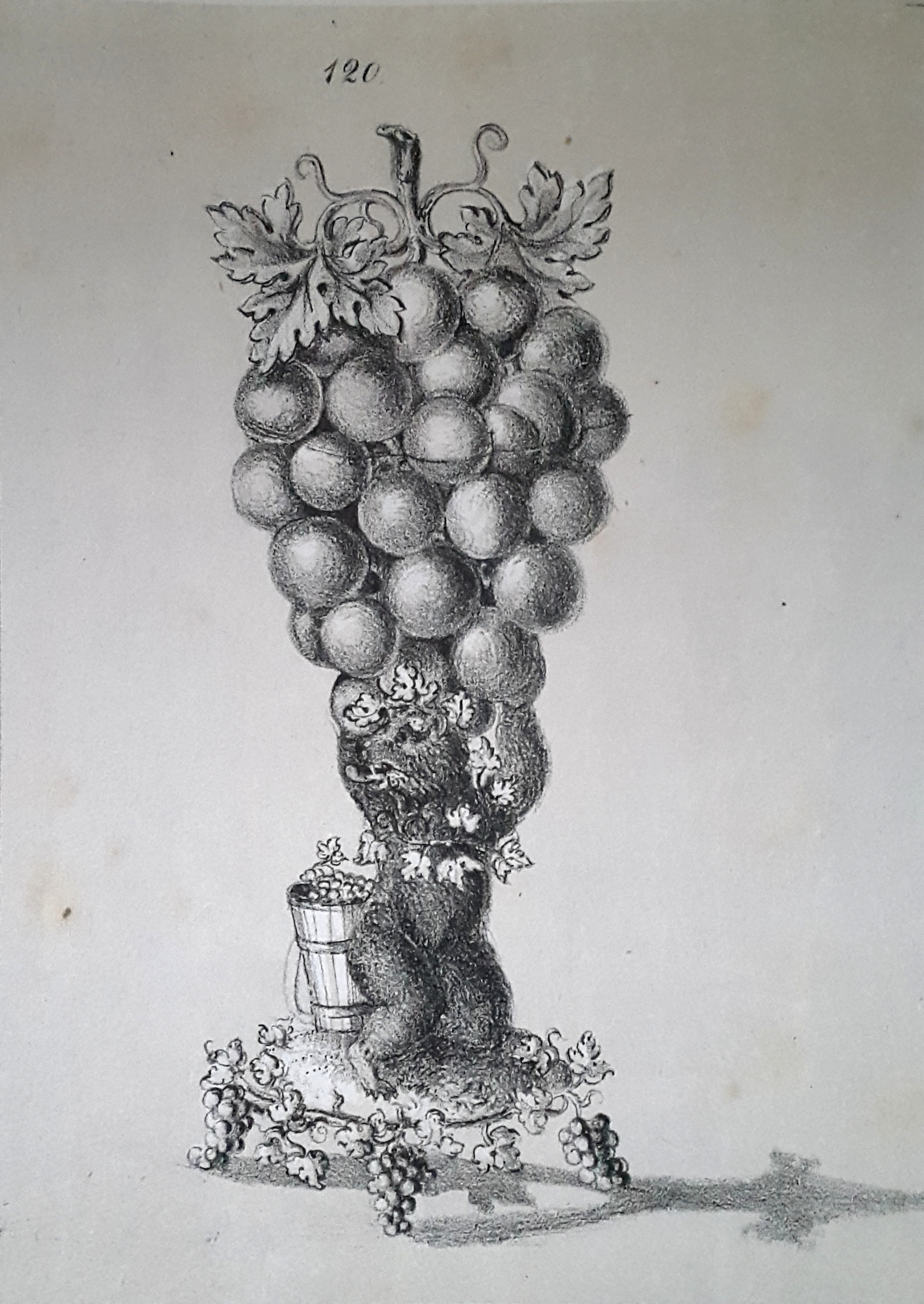 Pokal der Gesellschaft zu Rebleuten (verschollen).